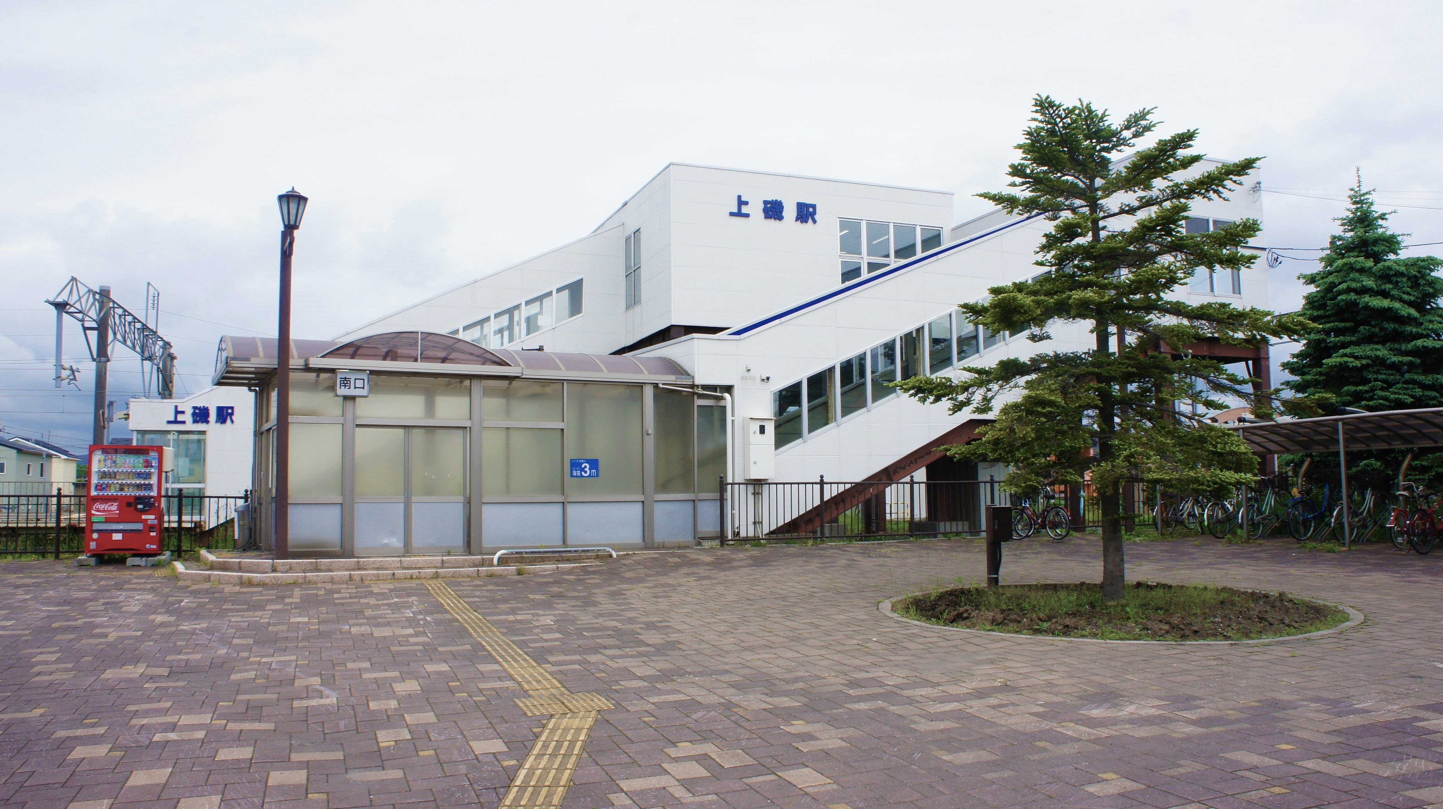 道南いさりび鉄道線・上磯駅の駅舎